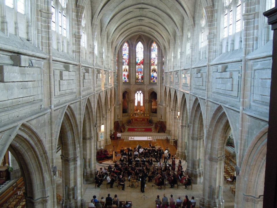 Représentation de l'Orchestre Universitaire de Lille à la cathédrale de Blois, accueilli par l'Orchestre Universitaire de Tours.